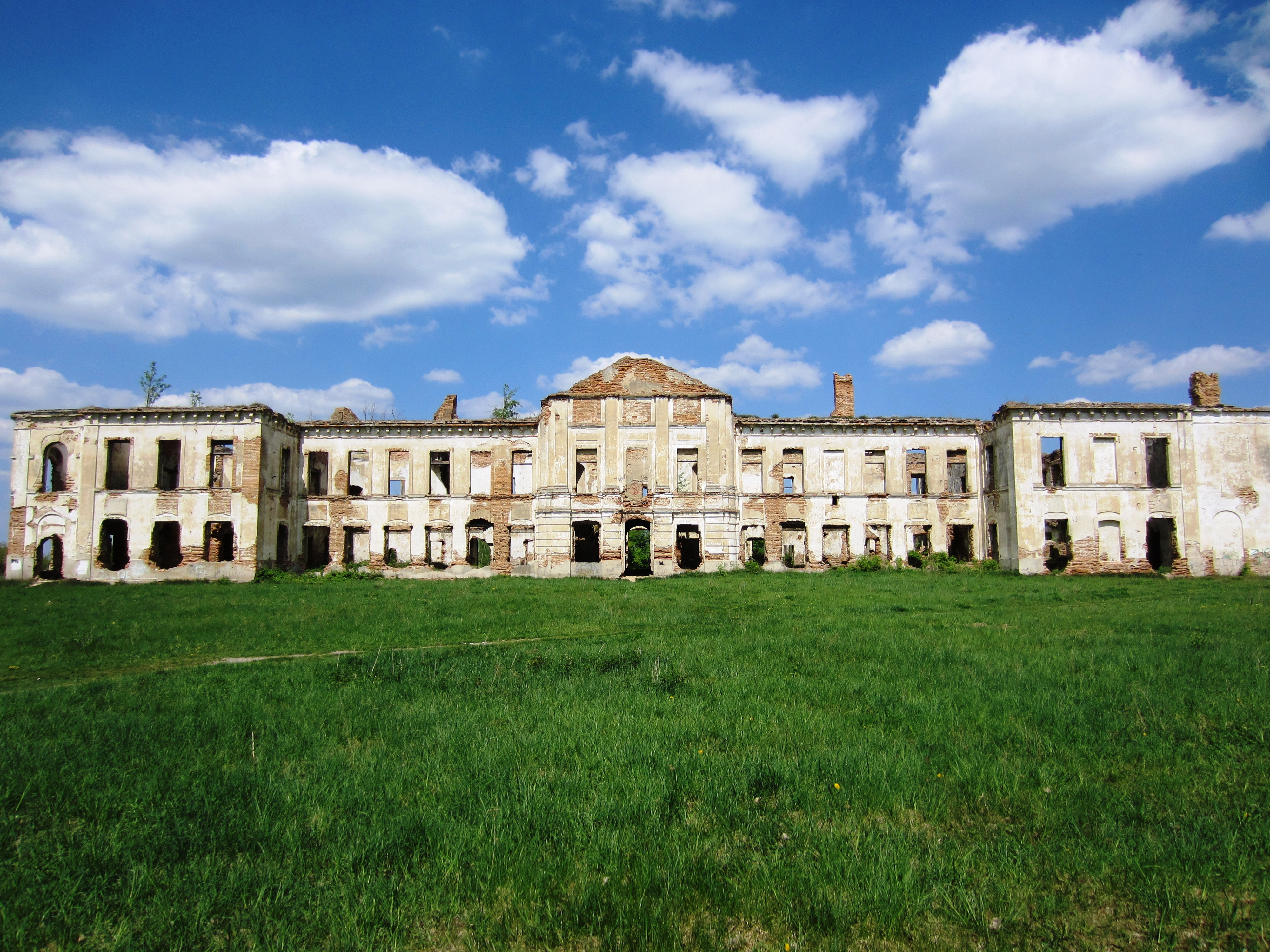 Палац (мур.), Ізяслав